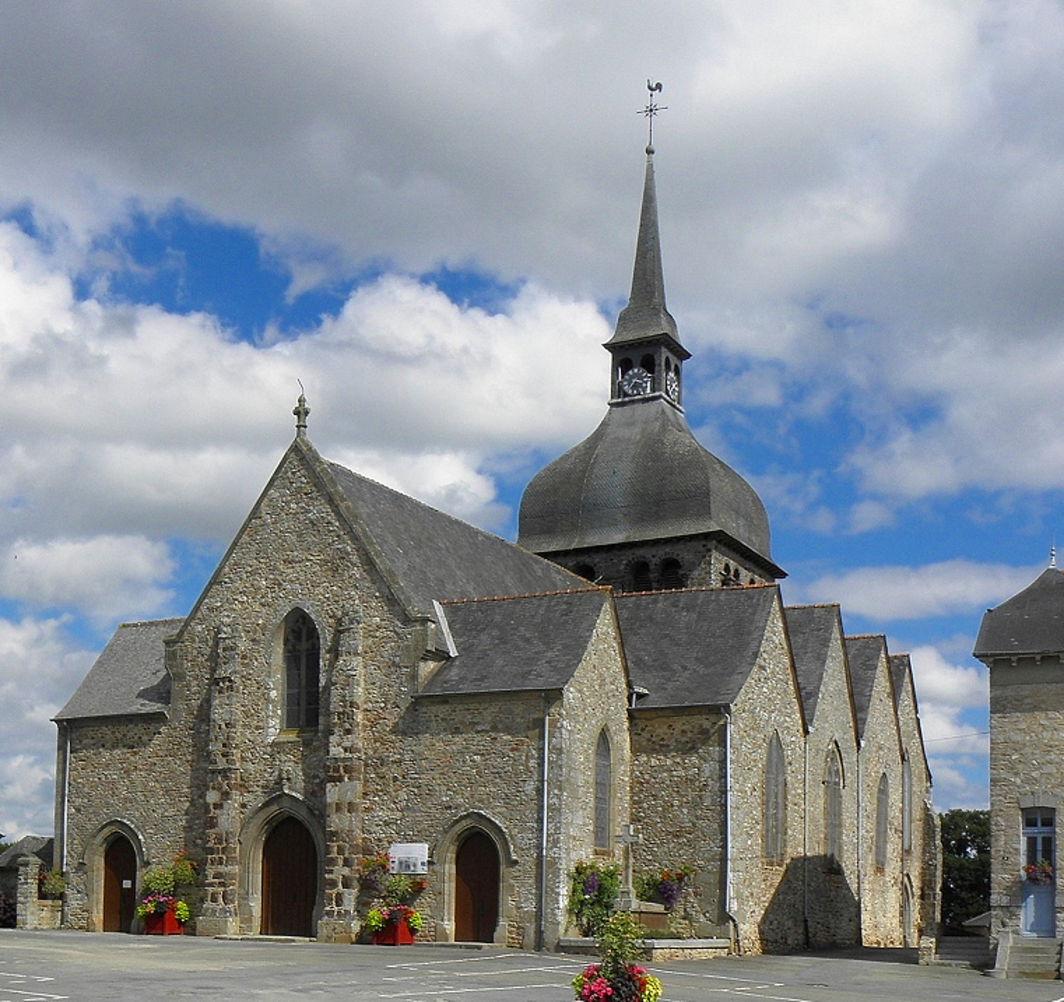 Église Notre-Dame de Livré-sur-Changeon (35). Façade occidentale et flanc sud.